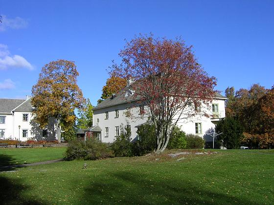 Internatshus och en del av huvudbyggnaden på Ingesunds folkhögskola.